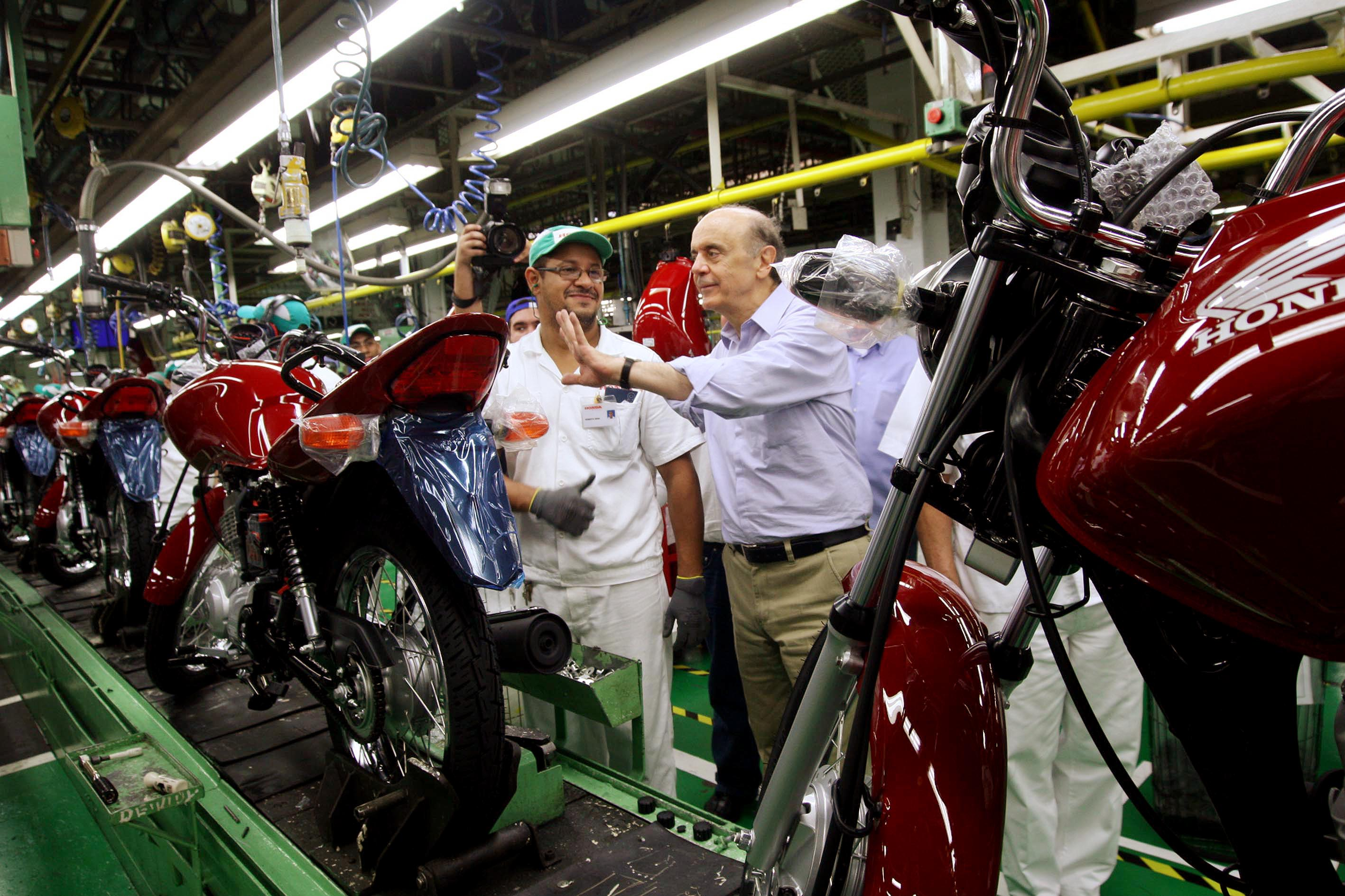 José Serra visita a linha de montagem da Honda em Manaus. Amazonas, 20/08/2010 - Foto Marcos Brandão/ObritoNews